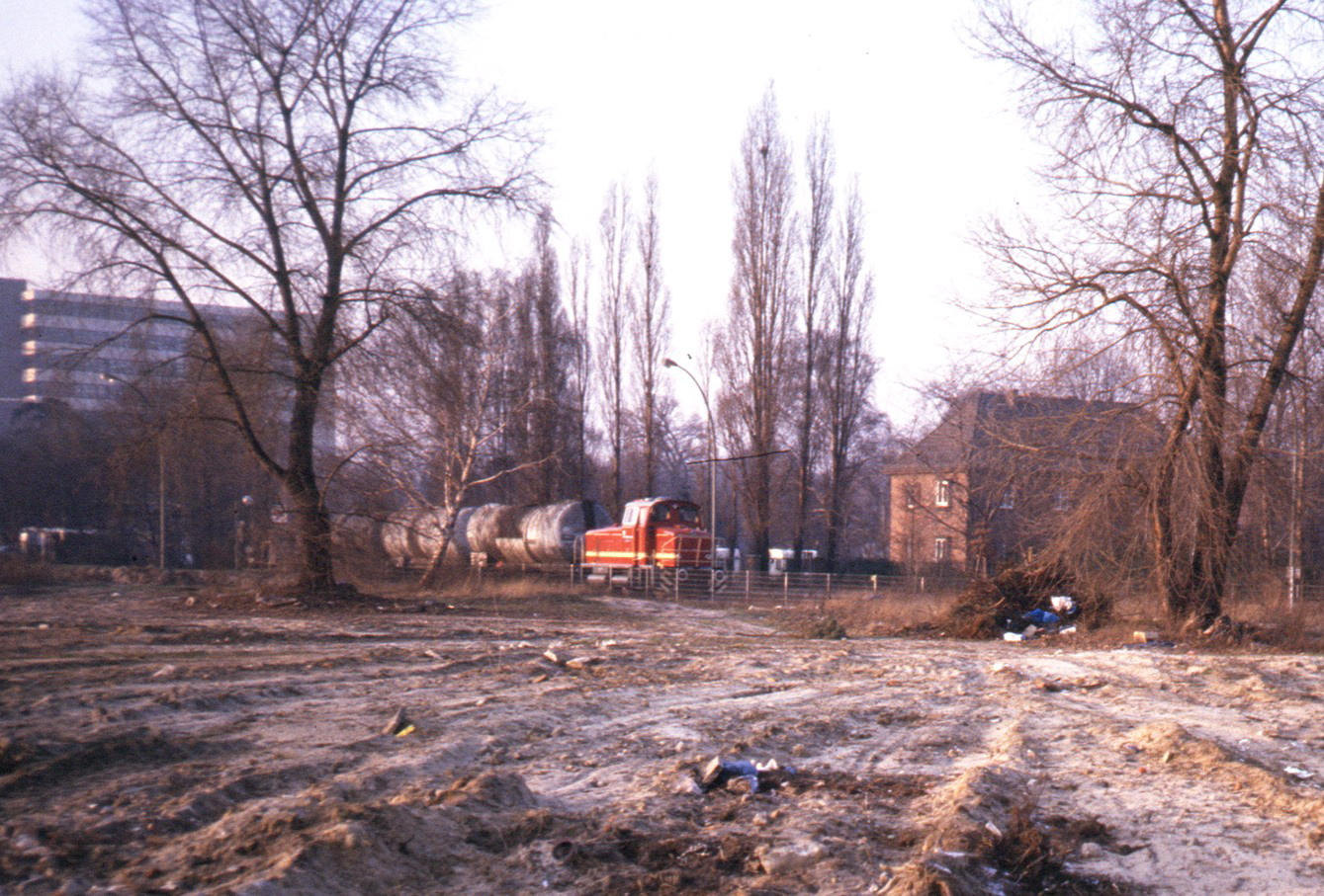 Güterzug Berlin Nonnendammallee